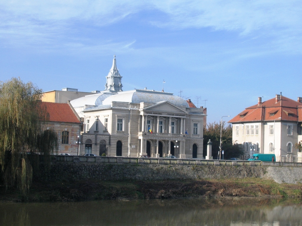 Traian Grozavescu Theater, Lugoj, Romania